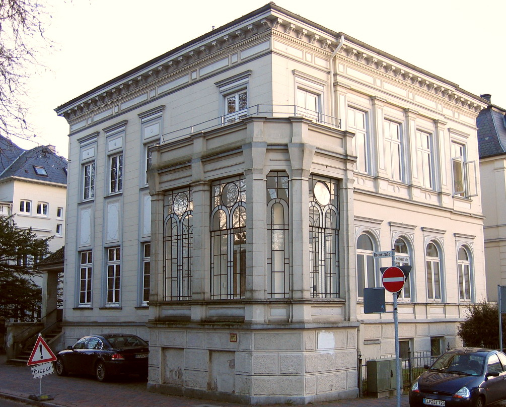 Altes Gymnasium Oldenburg - Gebäude Roonstraße